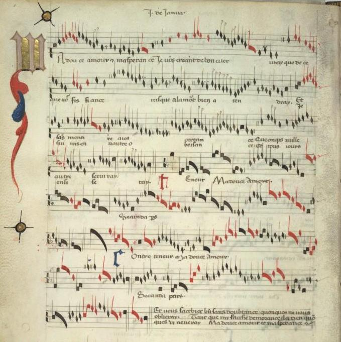 Codex Modena